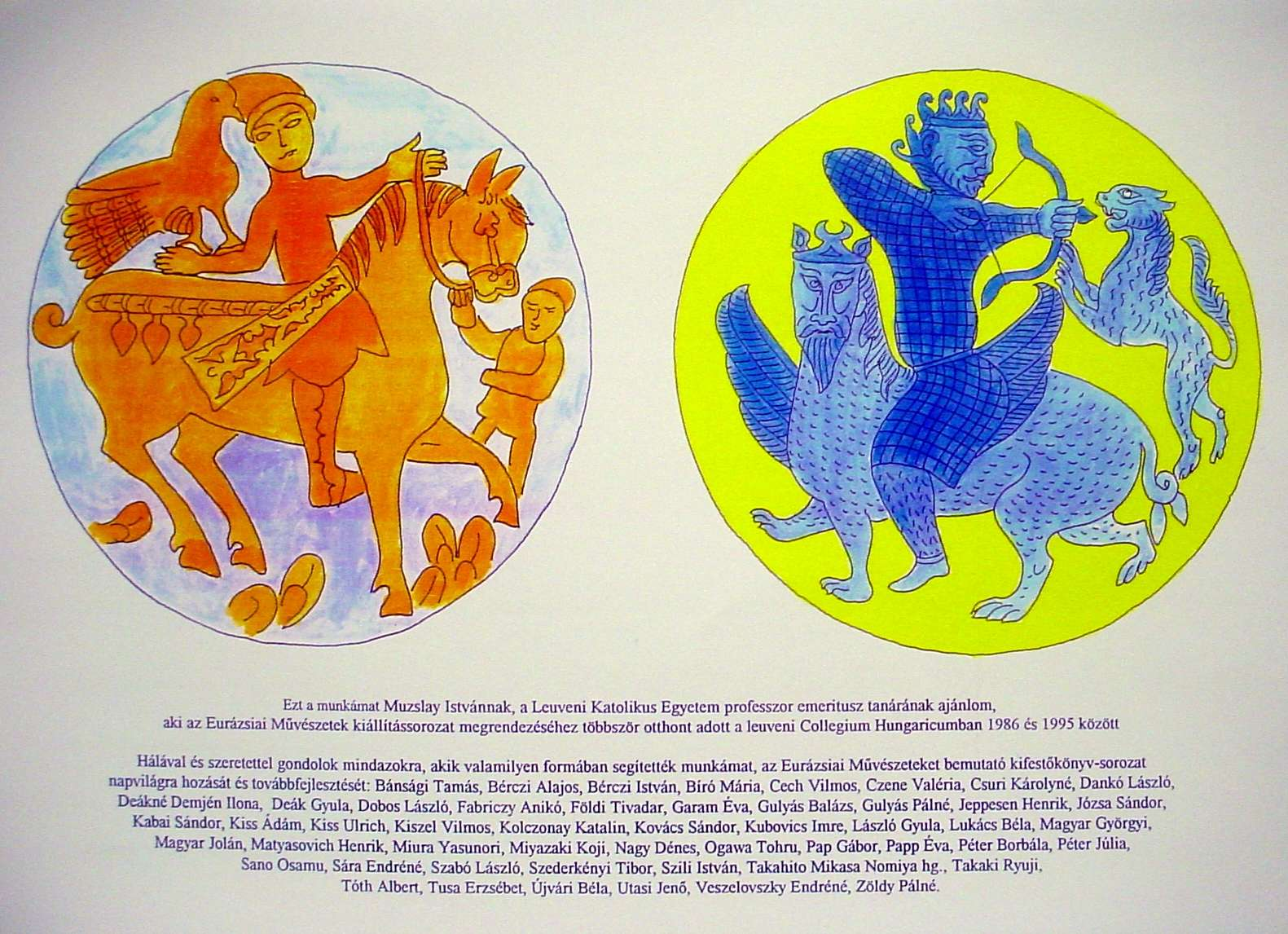 Két ezüsttál vadászati és harci jelenettel Iránból